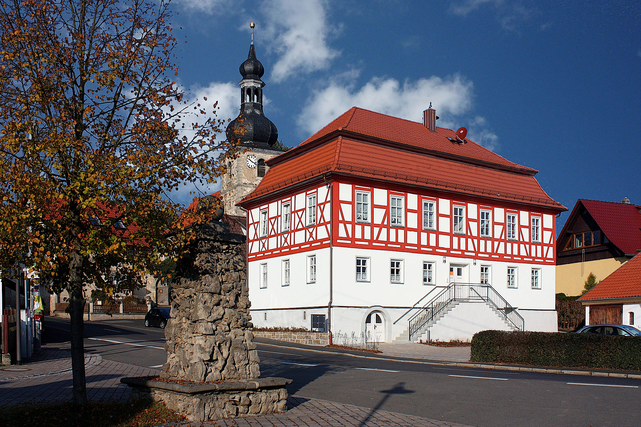 Wölfershausen/Thüringen Dorfzentrum, Neuaufnahme nach Renovierung des Zenthauses